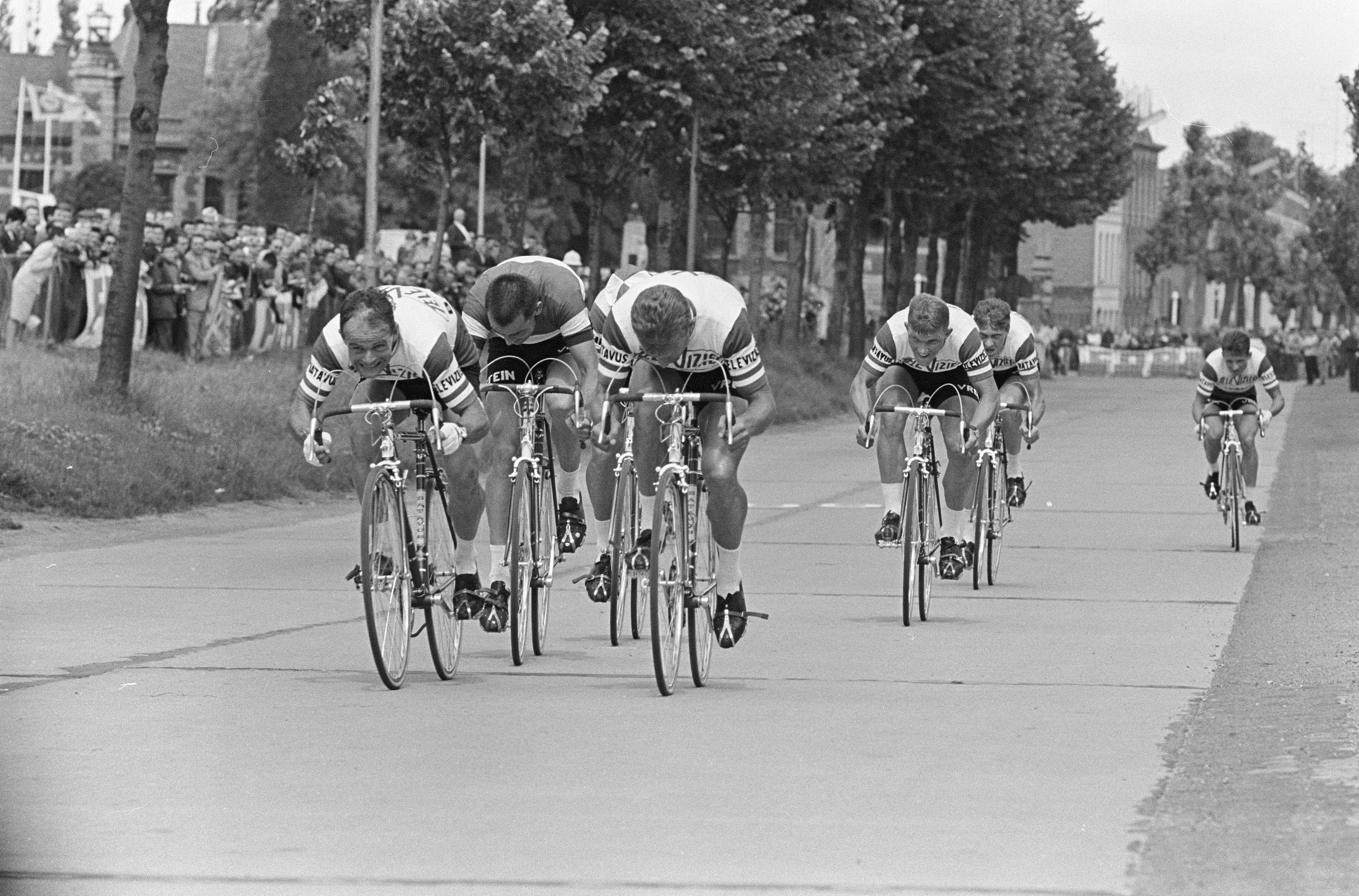 Collectie / Archief : Fotocollectie Anefo Reportage / Serie : Tour de France 1966 Beschrijving : De Televizierploeg tijdens de tijdrit in Tournai Annotatie : Negatiefnummers 14 en 15: Rudi Altig Datum : 27 juni 1966 Locatie : Frankrijk, Tournai Trefwoorden : sportmanifestaties, wielersport, wielrennen Fotograaf : Fotograaf Onbekend / Anefo Auteursrechthebbende : Nationaal Archief Materiaalsoort : Negatief (zwart/wit) Nummer archiefinventaris : bekijk toegang 2.24.01.05 Bestanddeelnummer : 919-2997